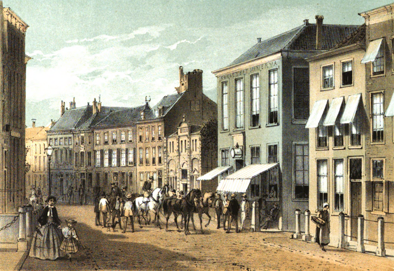 Illustratie gemaakt door Gerardus Johannes Bos voor het album De Stad Leiden : Album bevattende eenige afbeeldingen der voornaamste hoofdgebouwen en fraaiste gezigten in en nabij de stad Leiden. eerste Serie. Auteur: A Montagne; G J Bos; Uitgever: Leiden Couvée (1859).